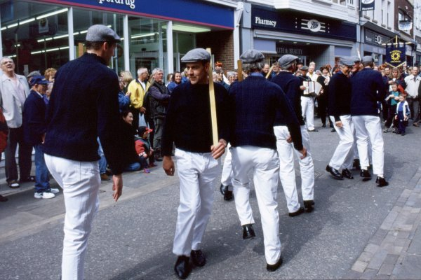 Flamborough Schwerttänzer / Beschreibung: Die Flamborough Schwerttänzer beim World Millennium Sword Spectacular, Whitby, England, Mai 2000